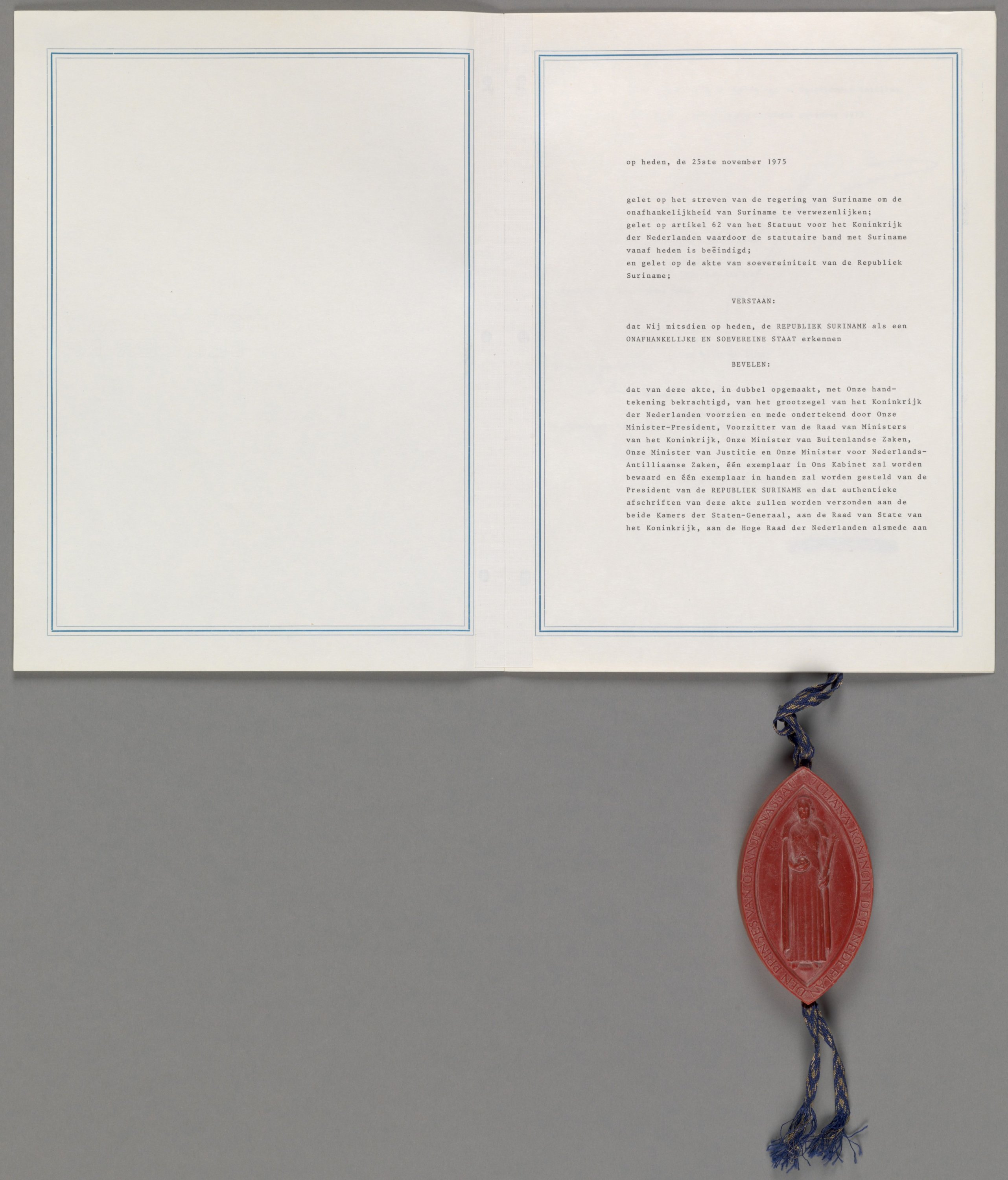 Onafhankelijkheidsverklaring van Suriname 1975